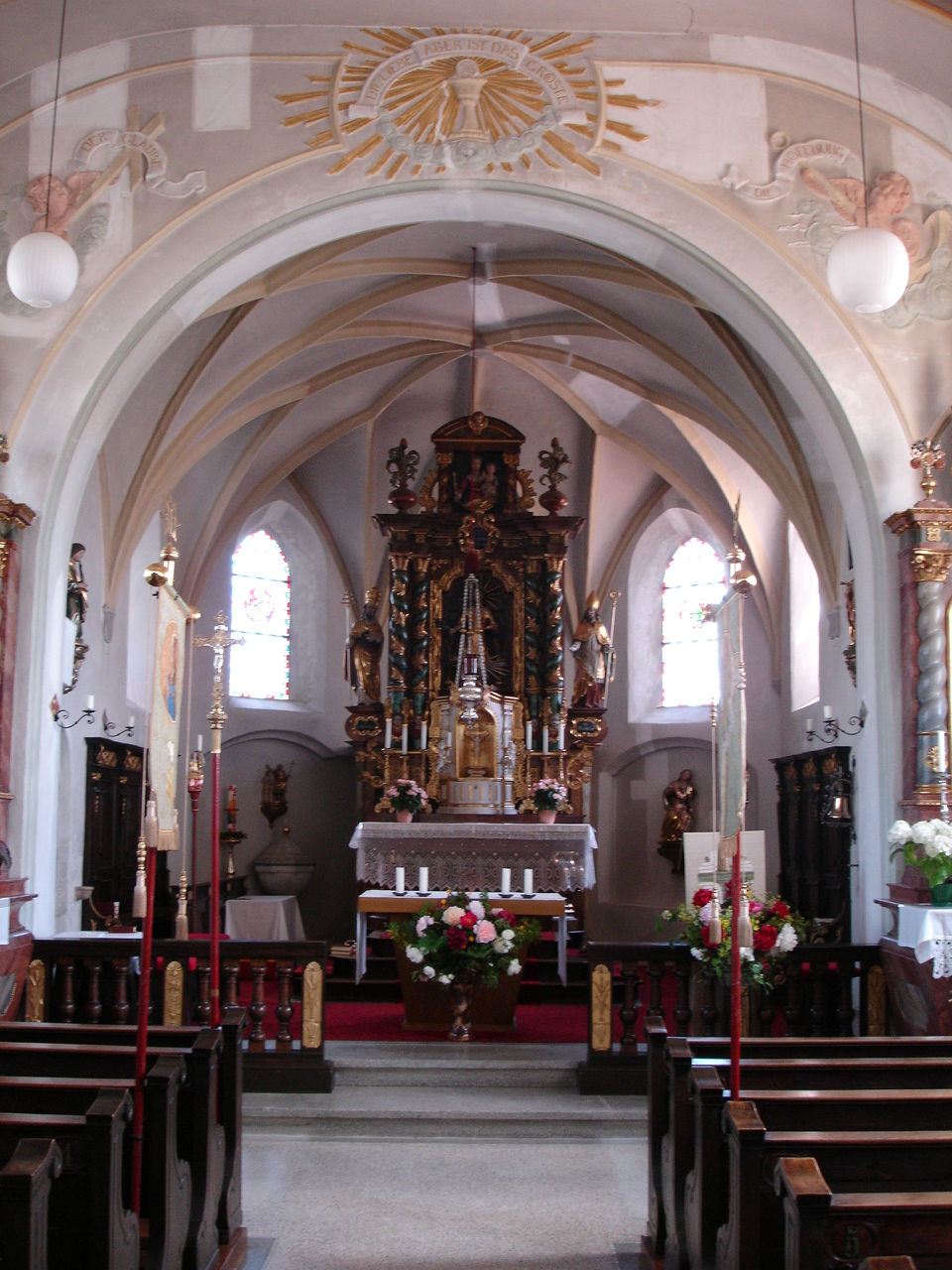 Altar der Filialkirche St. Stephan in Hohenzell, Gemeinde Altomünster